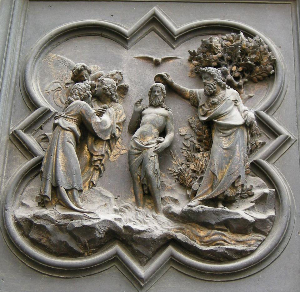 5 Battesimo